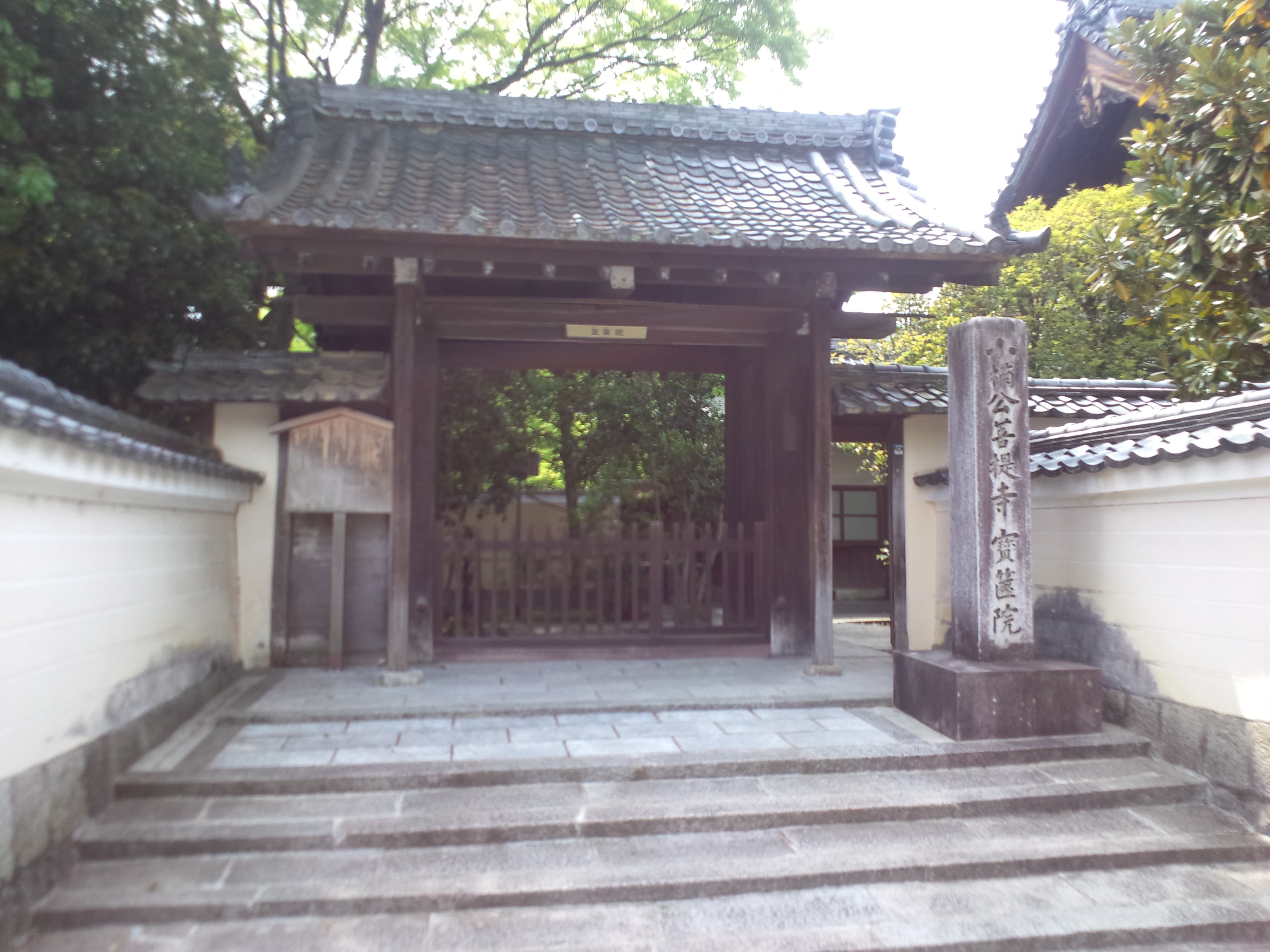 宝筐院 入口の門